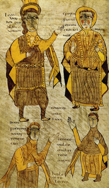 Lodhanri, roi des Alamans, en compagnie d'un évêque, d'un duc et d'un comte. Bréviaire d'Alaric. Vallée de la Loire (?), 803-814. BnF, Manuscrits, Latin 4404 fol. 197v.